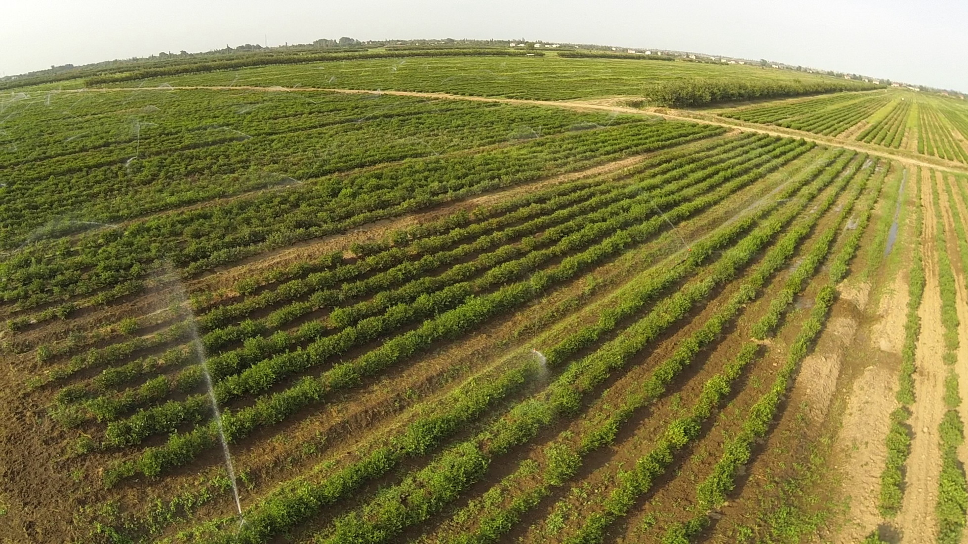 İlham Əliyev Lənkəranda “Astaraçay” MMC-nin çay plantasiyalarına baxarkən